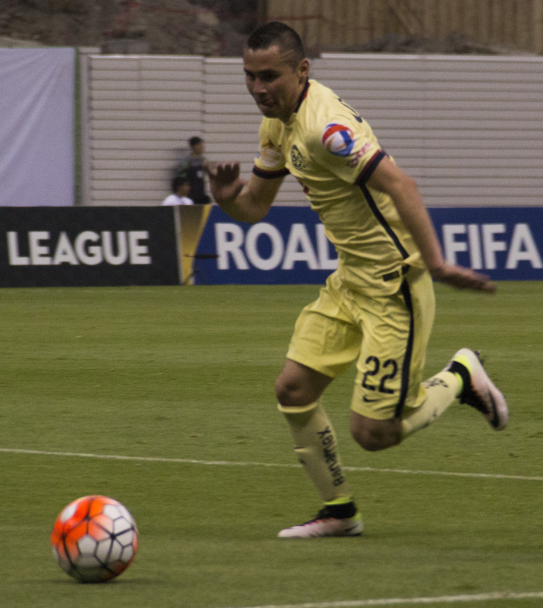 América vs Santos